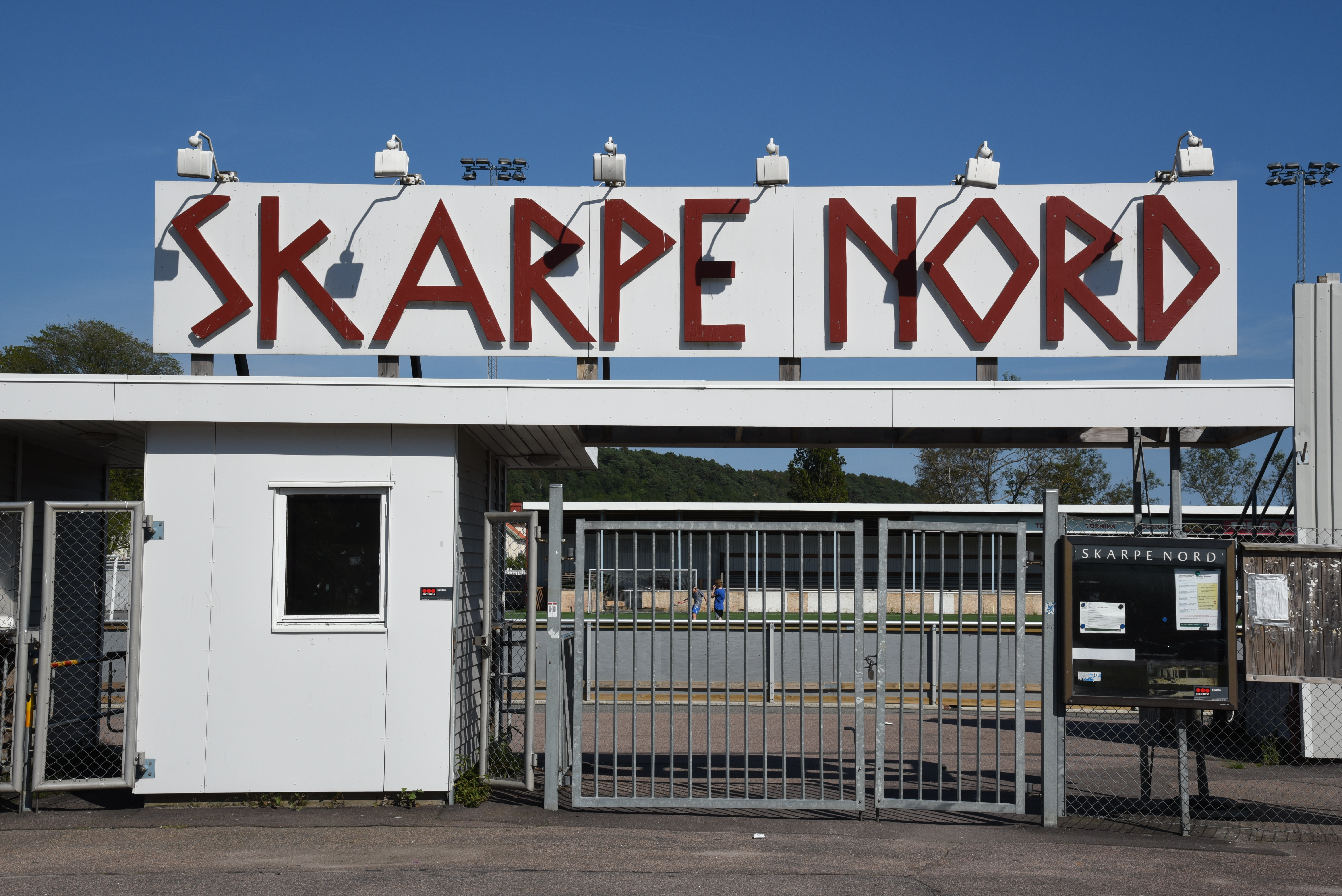 Entrén till utomhusarenan Skarpe Nord i Kungälv.